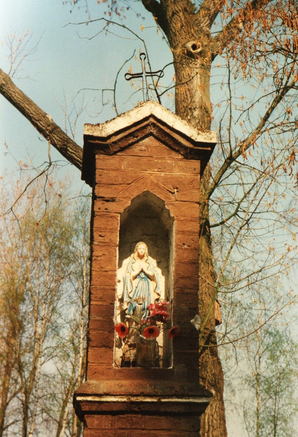 Kapliczka w Strzeszynku - Poznań. 23.4.1993r.